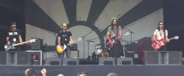 El grup Gossos, performant "Corren" durant la seva prova de so (abans el seu concert a La Mercè), setembre 2011. D'esquerre: Roger Farré, Juanjo Muñoz, Natxo Tarrés i Oriol Farré. (inici de la captació)